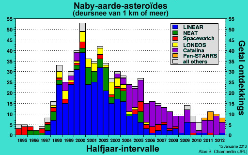 Ontdekte asteroïdes met 'n deursnee van 1 km of meer